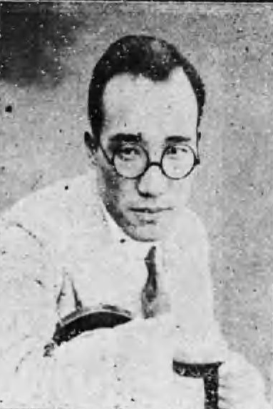 正邦宏、1923年の写真